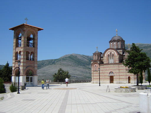 Hercegovačka gračanica u Trebinju.